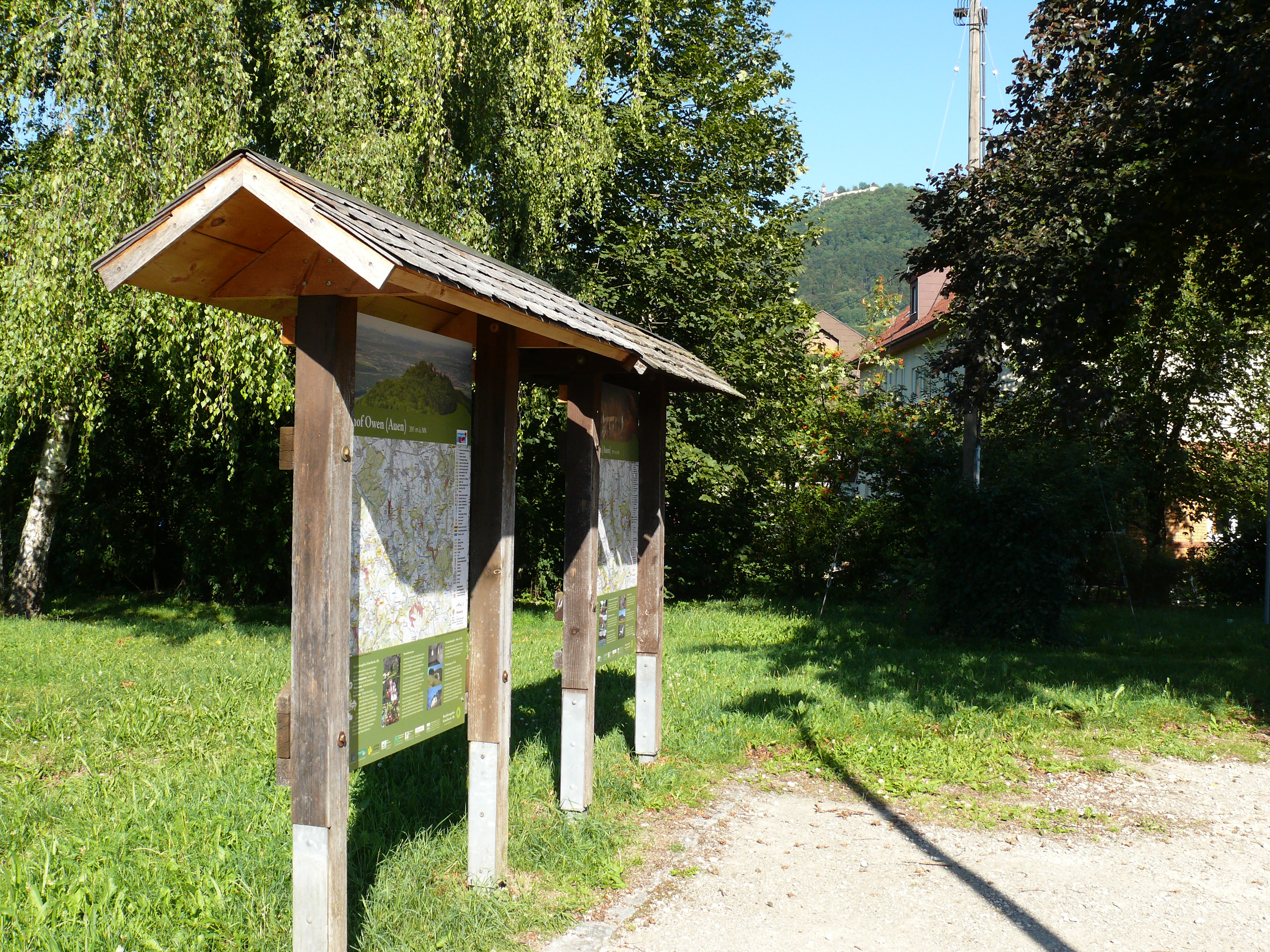 An den Haltepunkten entlang der Teckbahn stehen Wanderkarten, wie hier in Owen. Oben thront die Burg Teck.